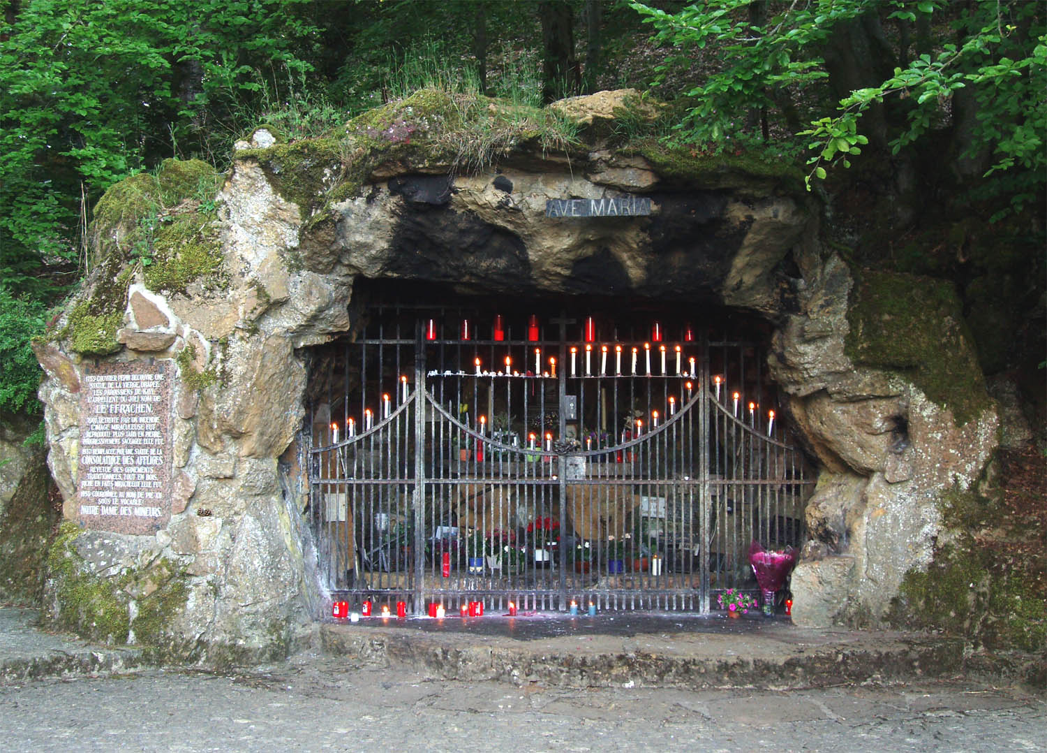 Grott vun der Léif'frächen.